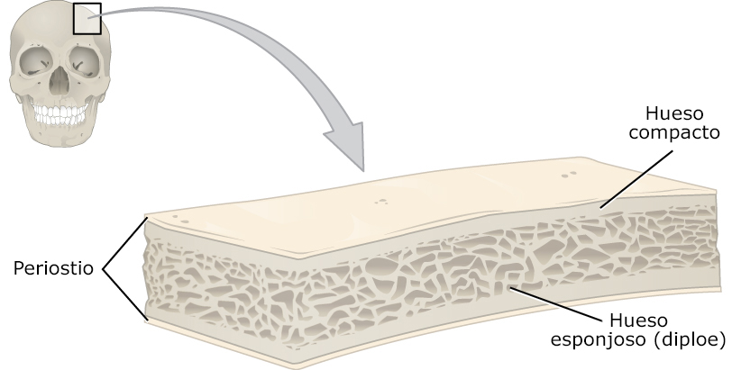 Esquema del hueso plano del cráneo. Puede observarse el diploe oseo, el hueso esponjoso y el complacto.